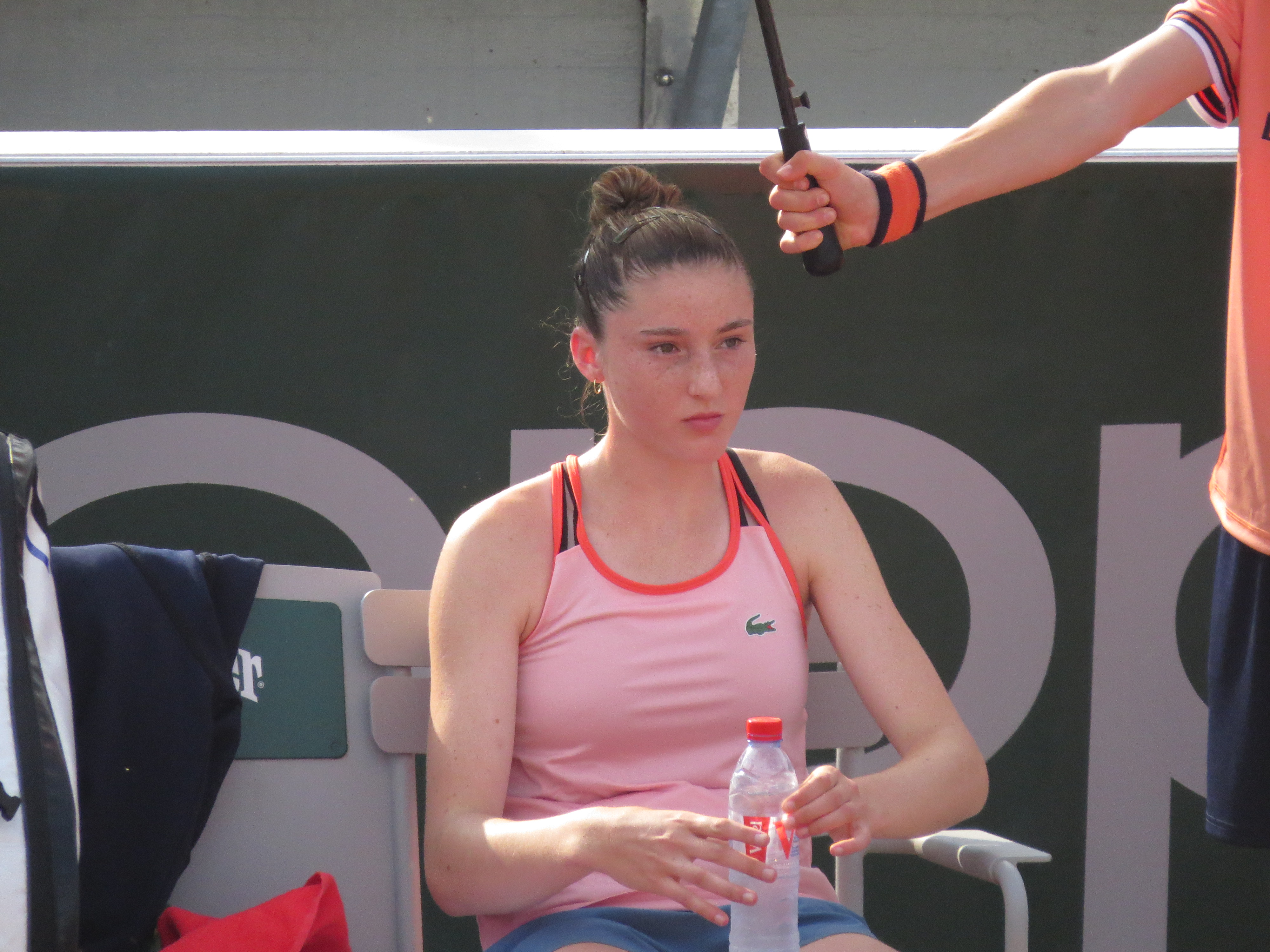 Elsa Jacquemot lors de son premier tour des qualifications.